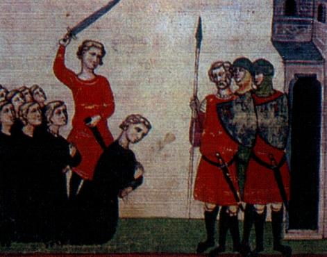 Poprava Konradina a Fridricha Bádenského